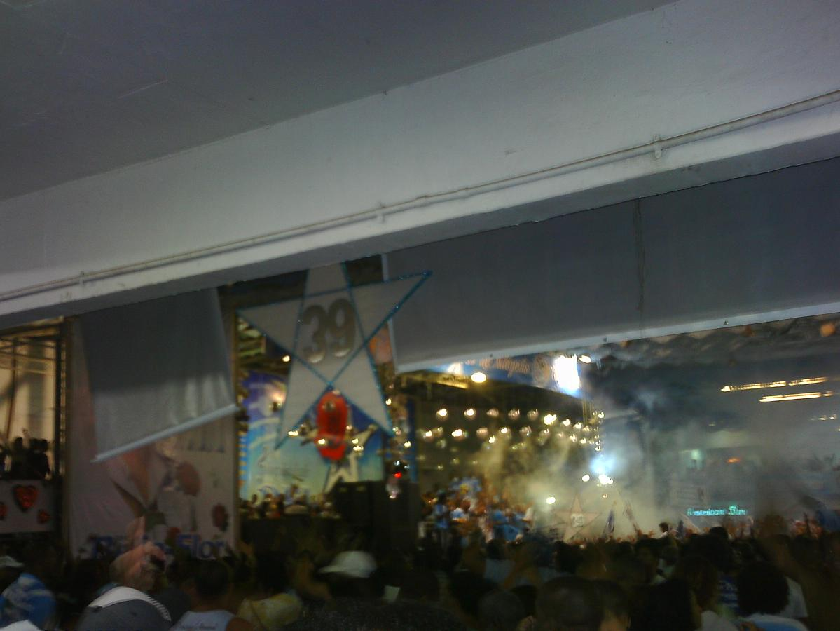 Quadra da Beija-Flor durante a final da escolha de samba enredo para 2011, no dia 14-10-2010. Foto tirada após o anúncio do samba vencedor, de número 39, da parceria de Samir Trindade, Serginho Aguiar, JR Beija Flor, Sidney de Pilares, Jorginho Moreira e Théo M. Neto.